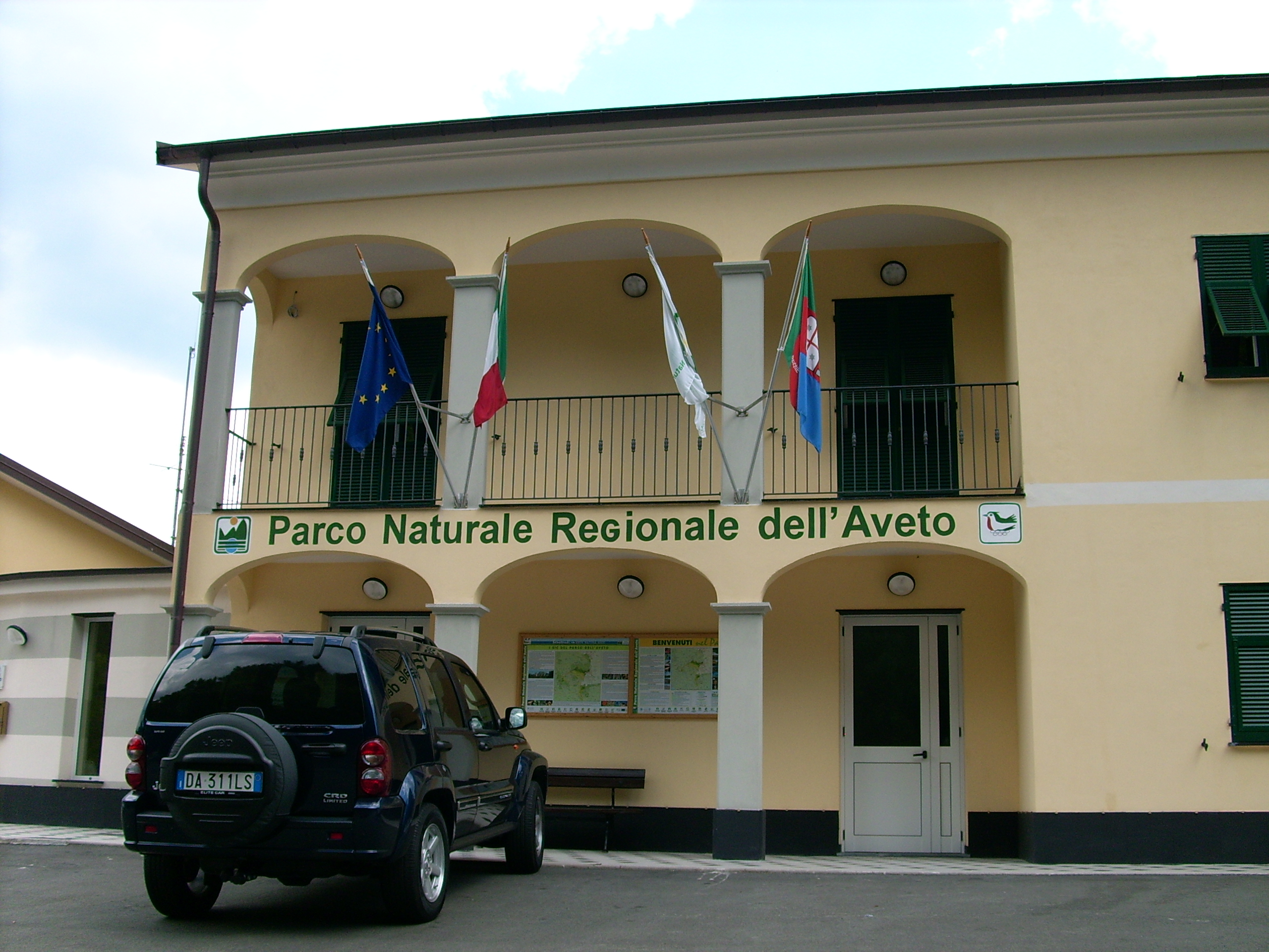 Sede del Parco Naturale Regionale dell'Aveto, Rezzoaglio, Liguria, Italia